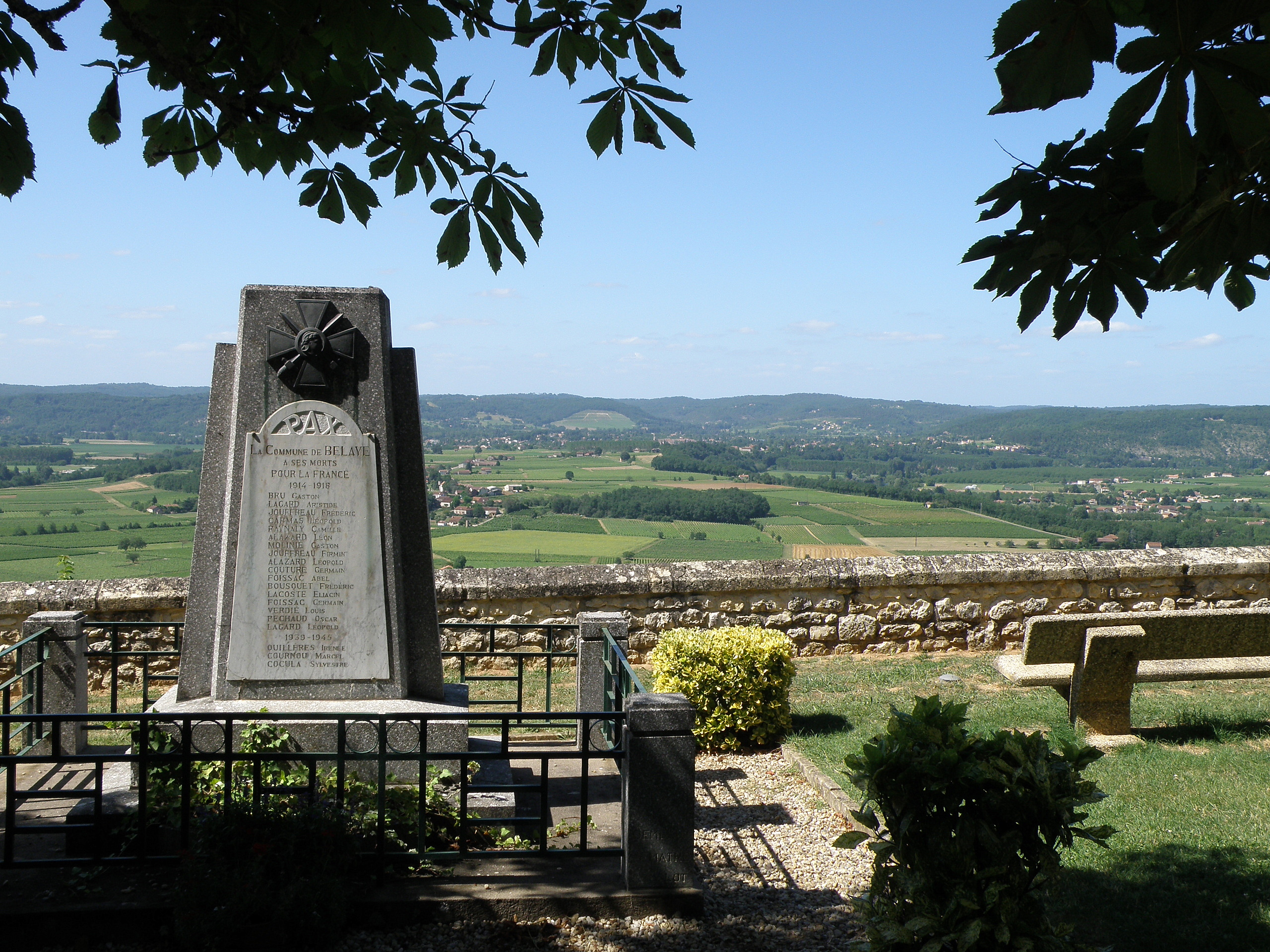 Bélaye, village et commune du dép. du Lot, région Midi-Pyrénées, France. Monument aux morts, construit au bord de la cévenne de Bélaye dominant la vallée du Lot.